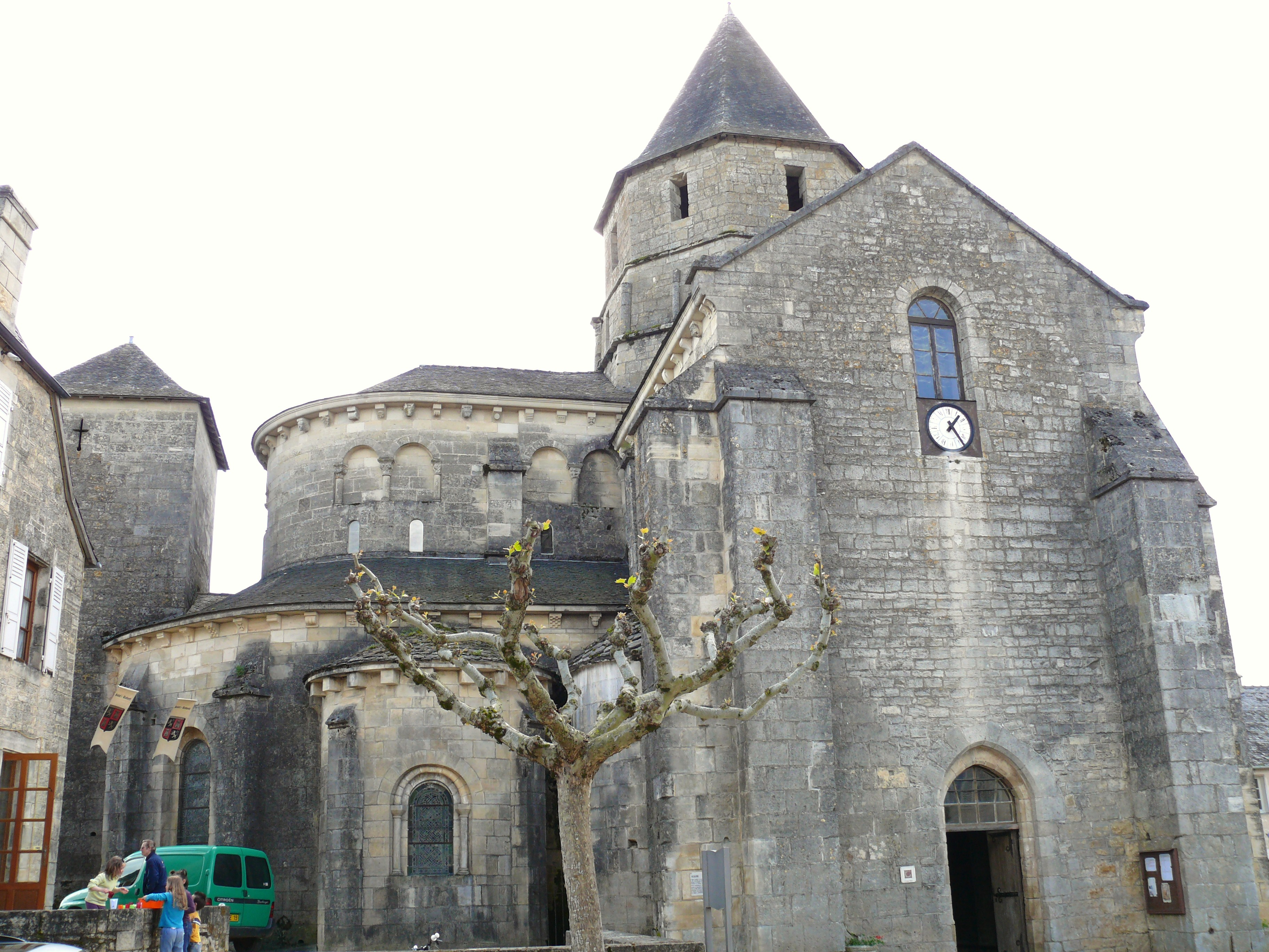 Saint-Robert - Eglise Saint-Robert - Ce qui reste de l'église